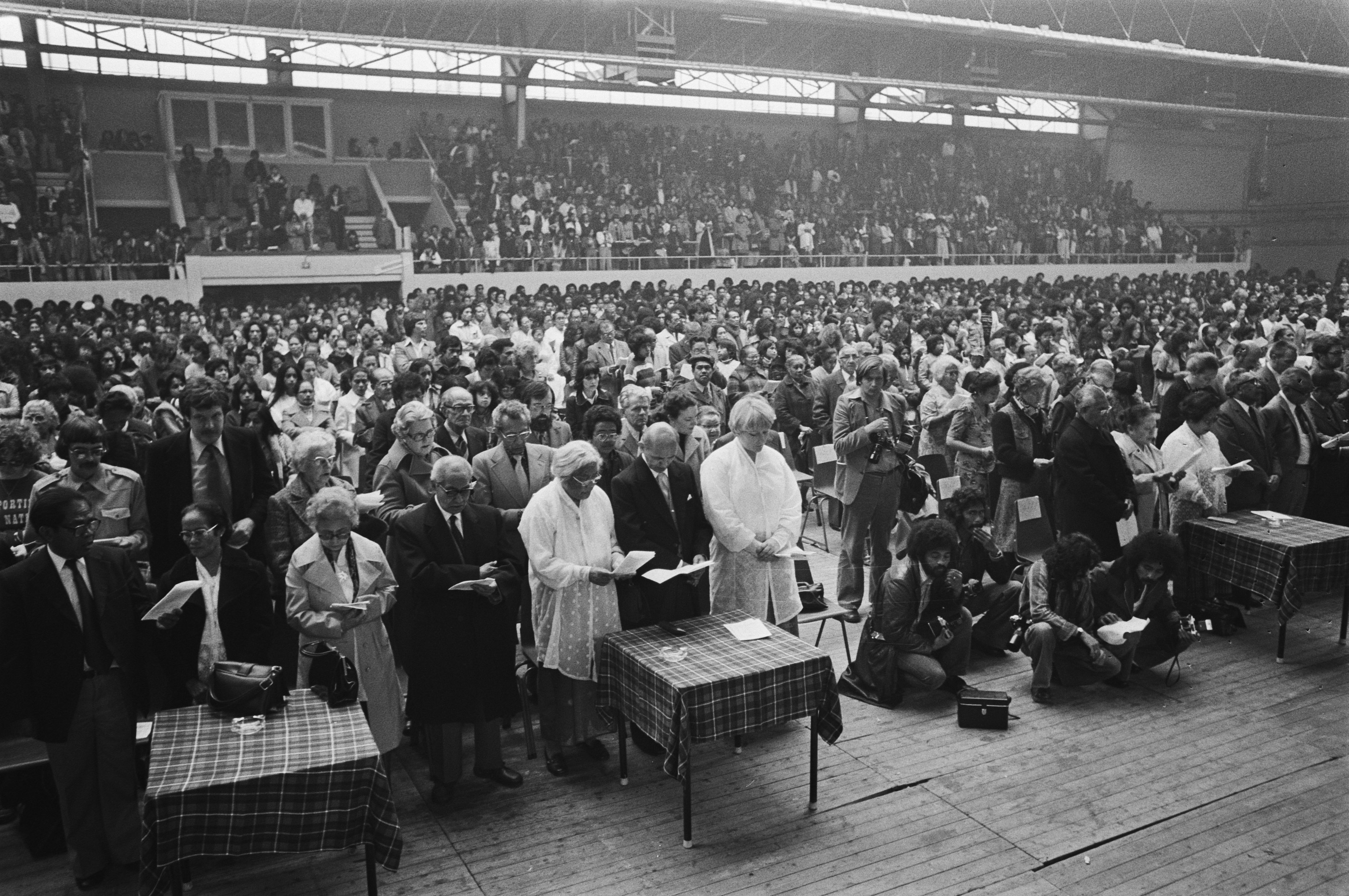 Collectie / Archief : Fotocollectie Anefo Reportage / Serie : Zuid-Molukkers herdenken in Den Haag hun onafhankelijkheidsproclamatie van 25 april 1950 Beschrijving : De Molukse gemeenschap bijeen in de Haagse Houtrusthallen Datum : 25 april 1977 Locatie : Den Haag, Zuid-Holland Trefwoorden : herdenkingen, manifestaties Fotograaf : Peters, Hans / Anefo Auteursrechthebbende : Nationaal Archief Materiaalsoort : Negatief (zwart/wit) Nummer archiefinventaris : bekijk toegang 2.24.01.05 Bestanddeelnummer : 929-1420